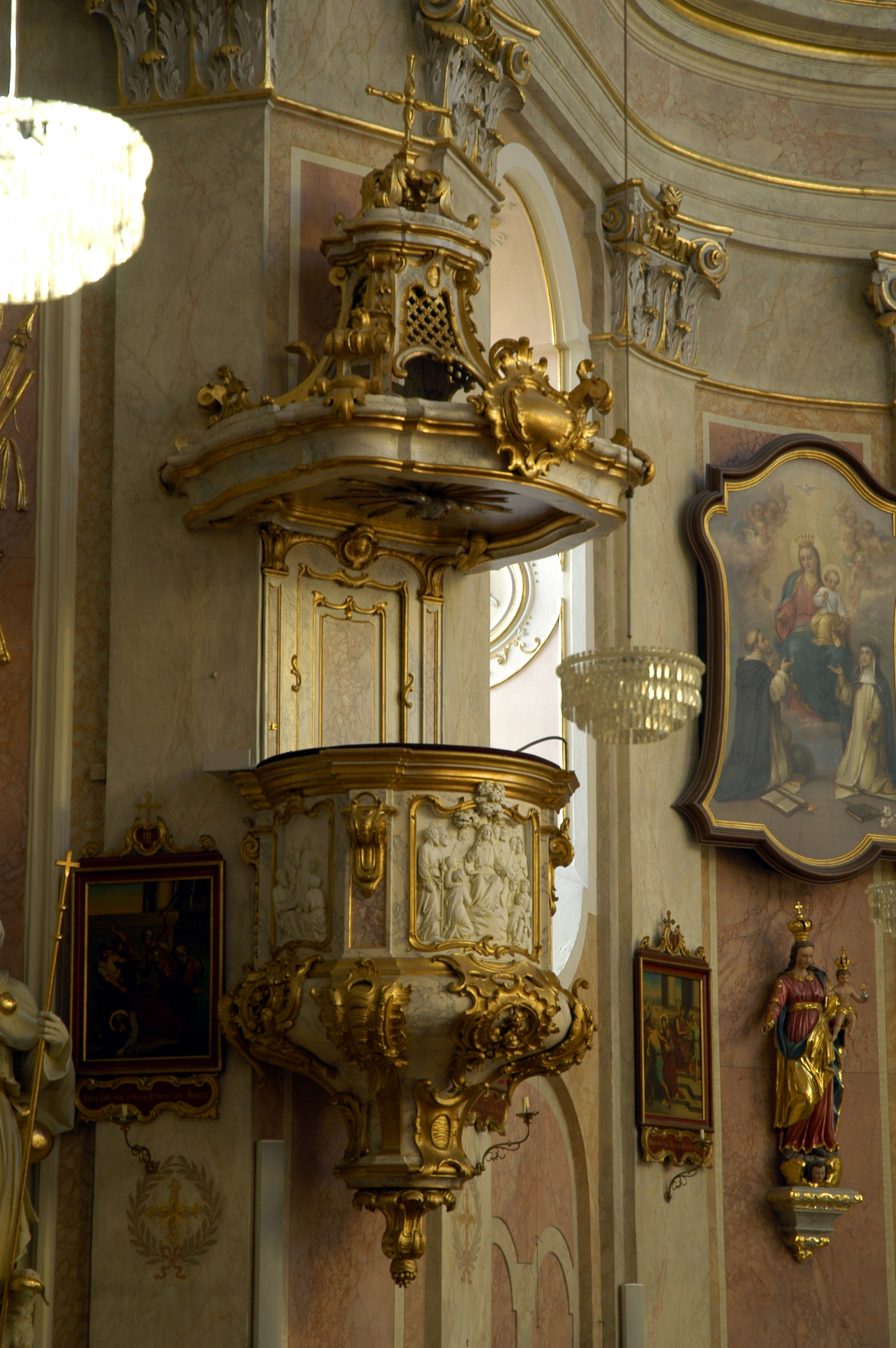 Kanzel der kath. Pfarrkirche Mariae Himmelfahrt in Straning